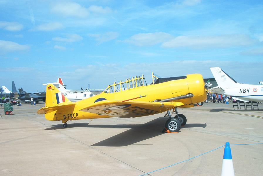 Harvard II at RIAT